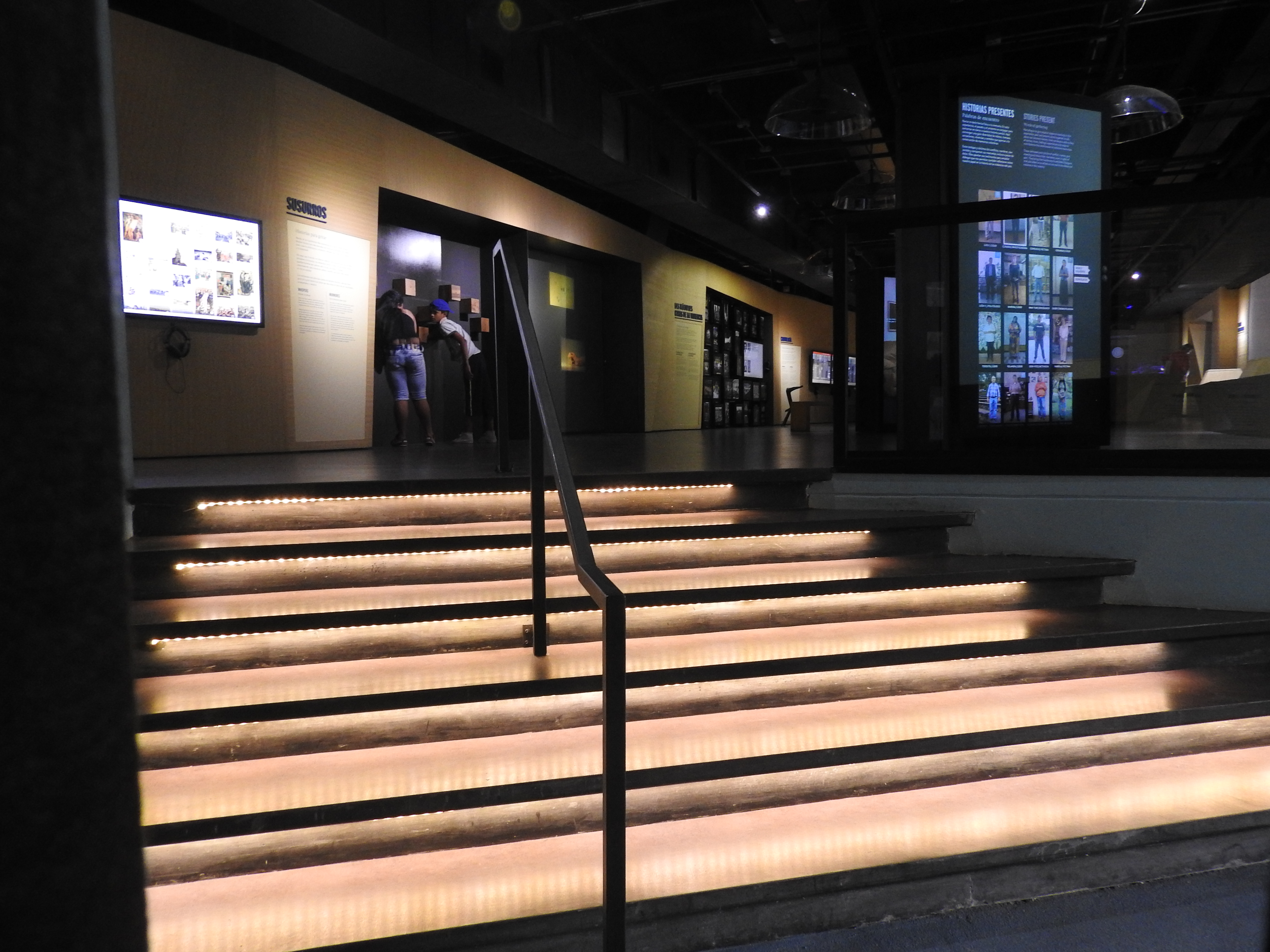 MUSEO DE LA MEMORIA MEDELLIN